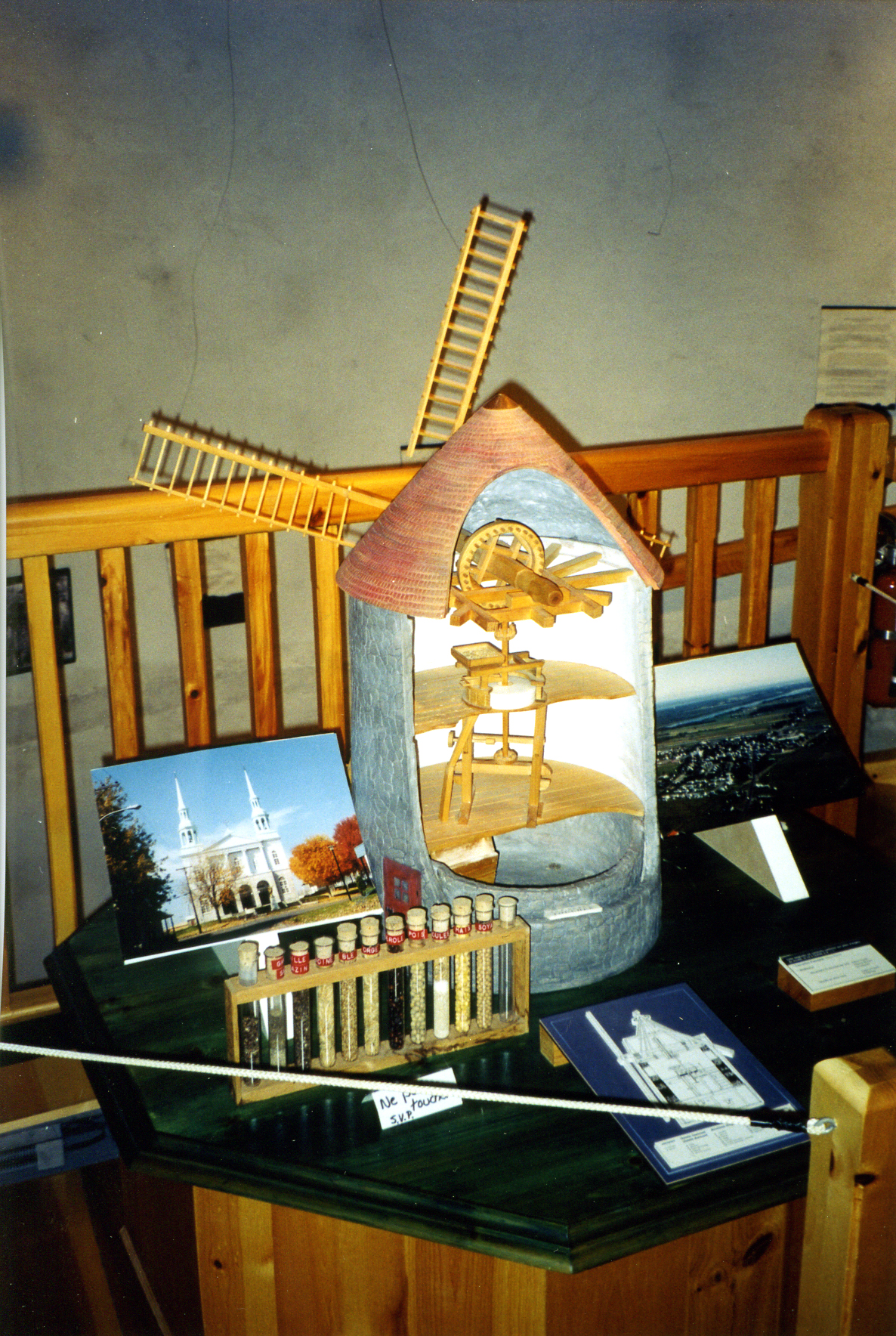 Maquette du Moulin à vent de Saint-Grégoire, à Bécancour (Québec); moulin à farine.